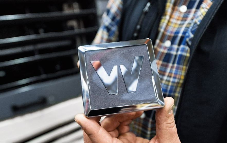 CI WIRTGEN GROUP